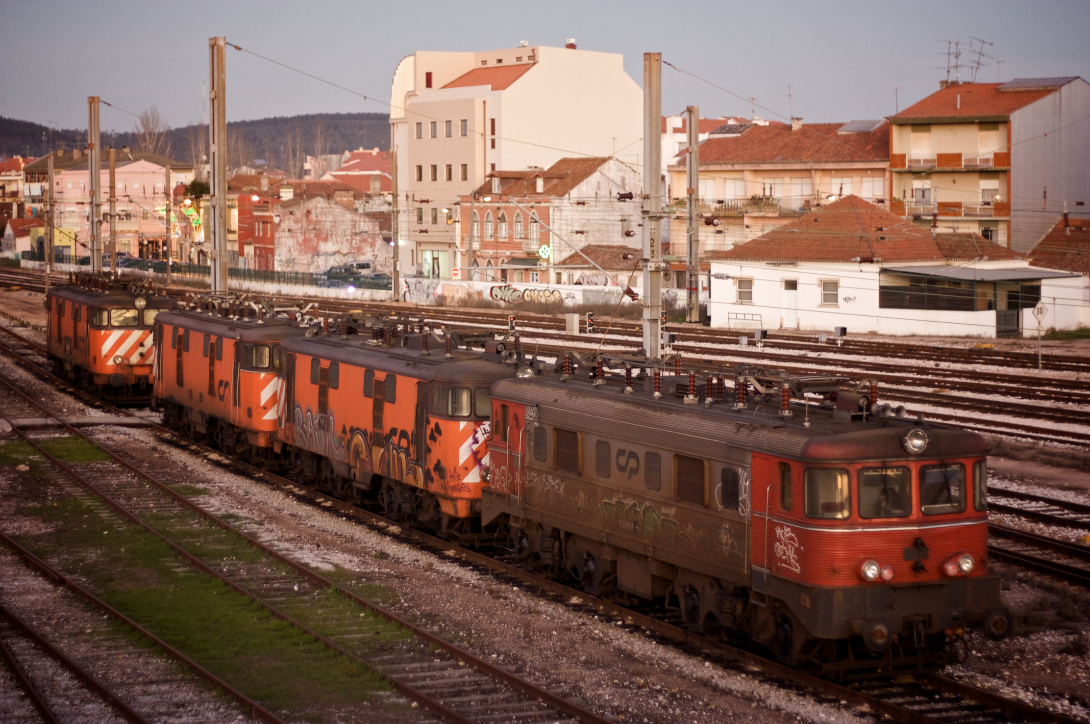 Local: Estação do Entroncamento [Linha do Norte, PK 106 • Linha da Beira Baixa, PK 106] Data e hora: 20 de Dezembro de 2008 [17h28] Material: Locomotivas 2552, 2507, 25xx e 2553 [Groupement 50 Hz - Alsthom / Henschel / Sorefame]